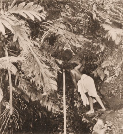 Fotografia usada per Paul Gauguin en el quadre Pape moe